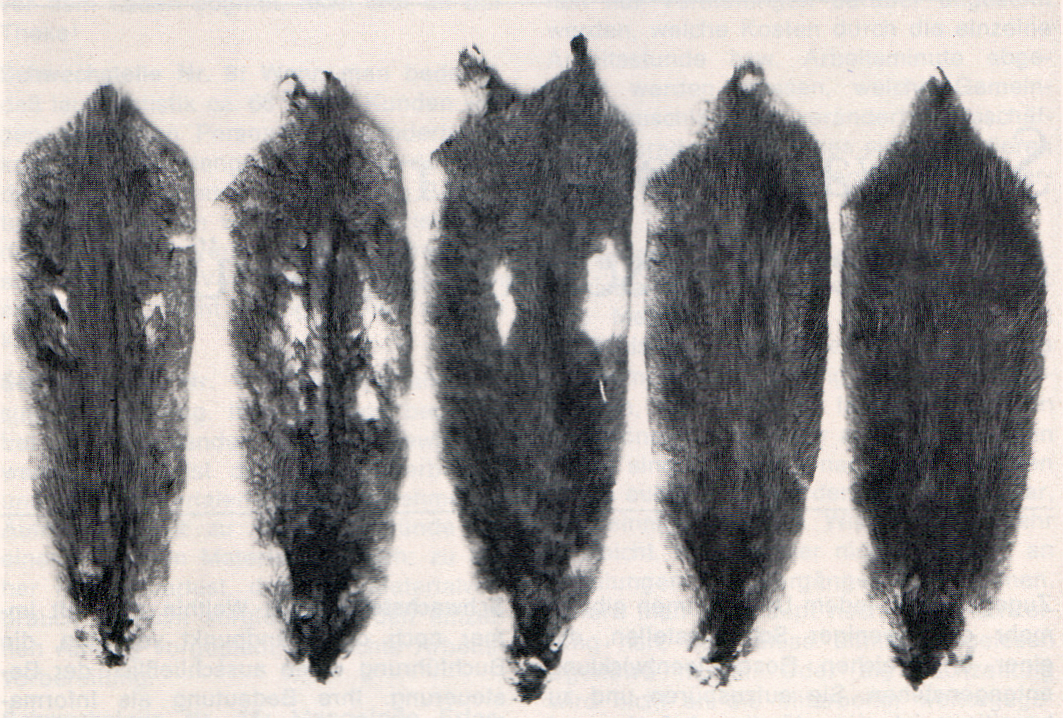 Flankendrüsenschäden, früher als Nierenstelligkeit bekannt, beim Bisamfell (Ondatra zibethicus) Von links nach rechts 1. Punktförmiger Grannenausfall links und rechts vom Grotzen 2. Schon gut zu erkennender Grannenausfall 3. Ausfall der gesamten Haarpartien an den betroffenen Stellen 4. Wiedernachwachsen der Grannenhaare im ersten Stadium 5. Weiter fortgeschrittener Nachwuchs, kurz vor dem Abschluss